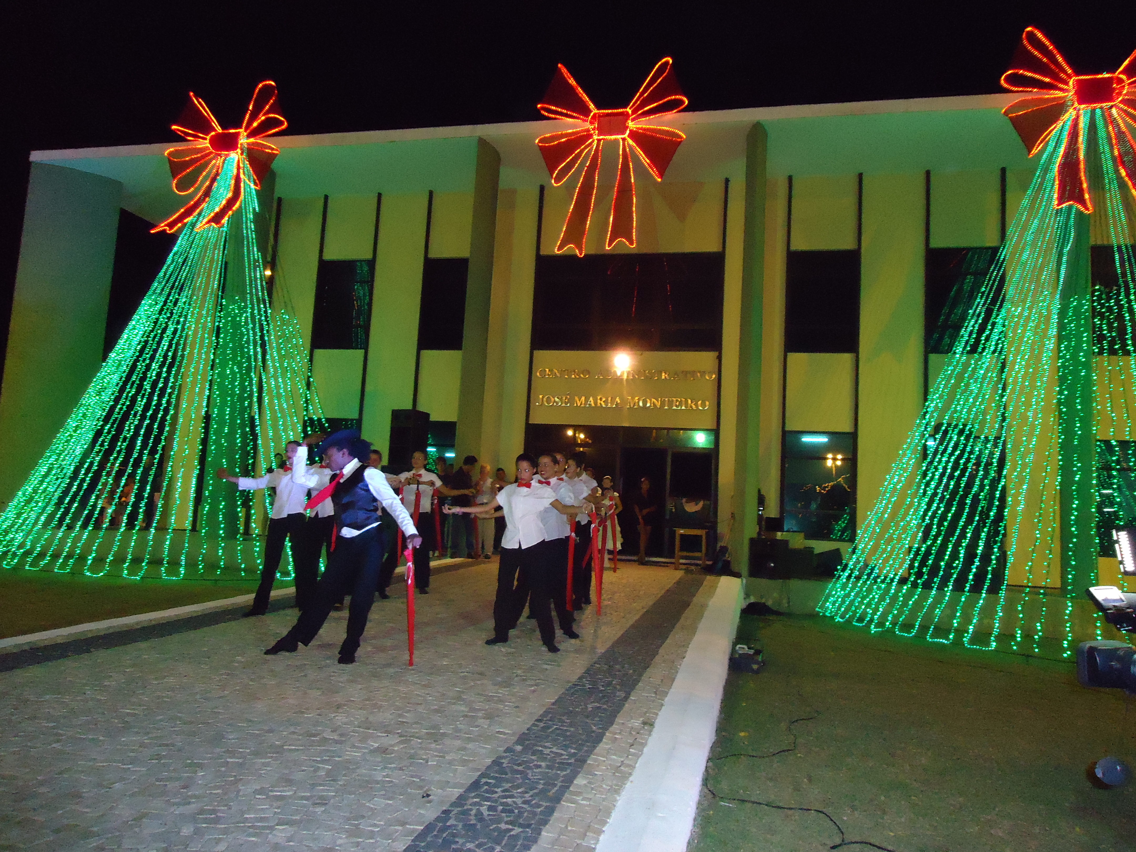 Itarema